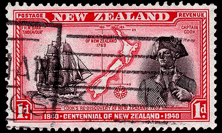 Капитан Джеймс Кук - путешественник, исследователь и картограф.